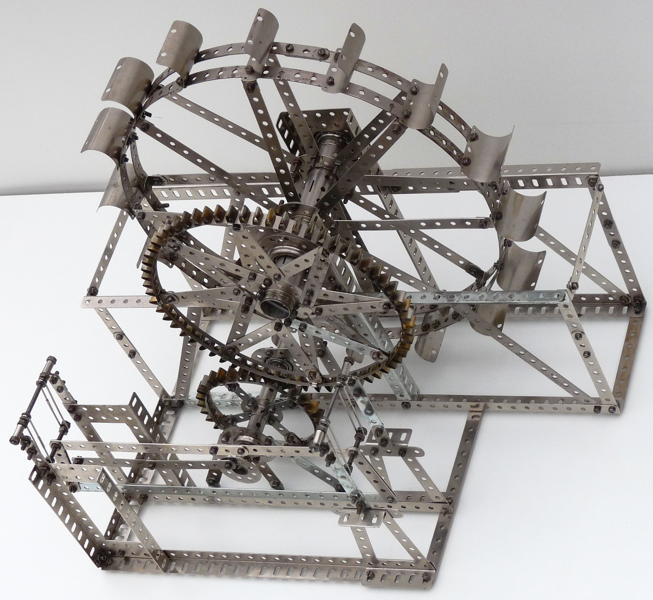 Das Modell zeigt Eigenschaften von Teilen der Stabil Erfinderbaukästen. Es sind kugelgelagerte Gerollte Wellen mit großen Zahnrädern eingebaut.